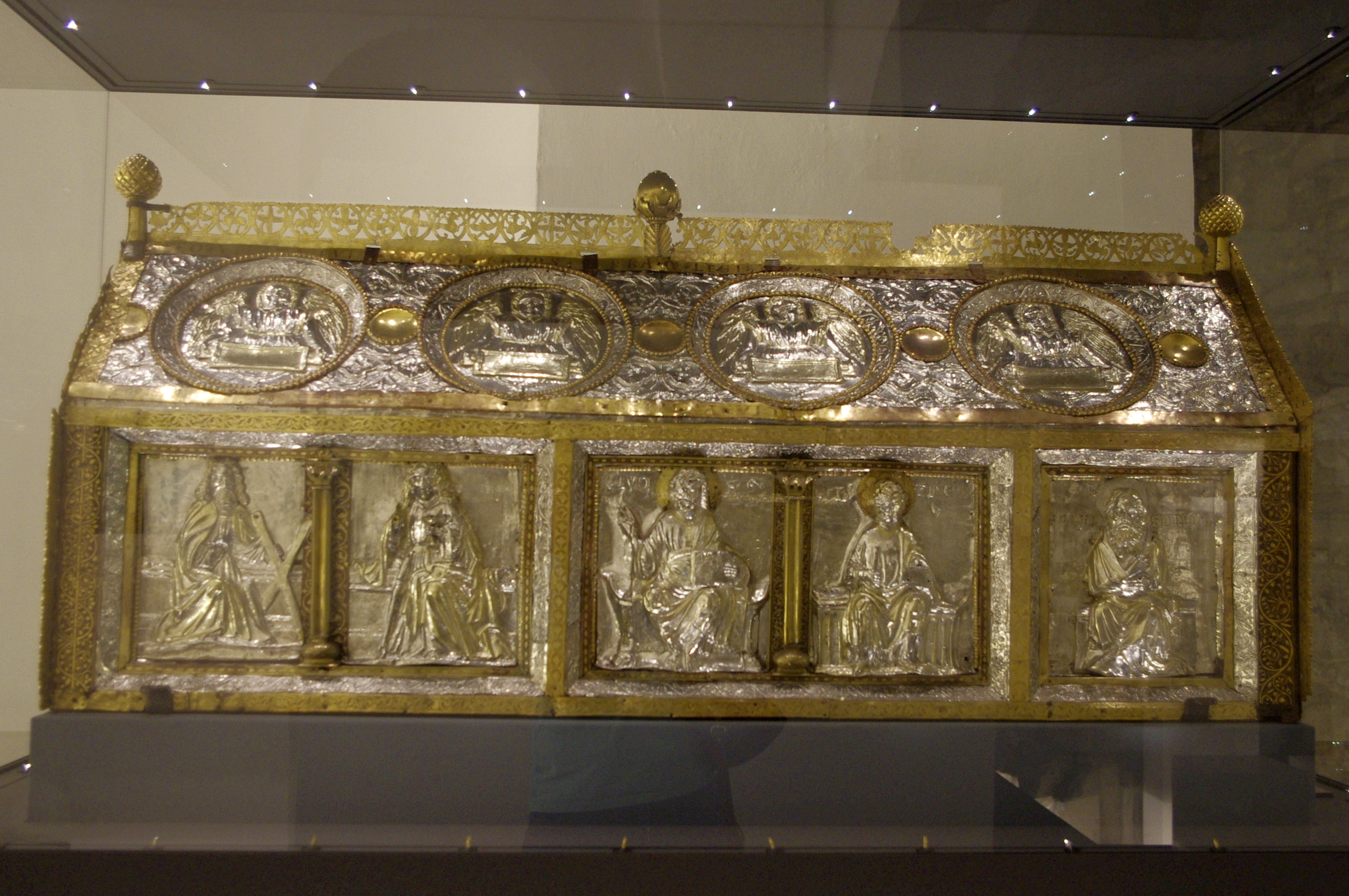 Trésor de la collégiale Notre-Dame, Huy - châsse de saint Domitien, 1182, orfèvre: Godefroid de Huy